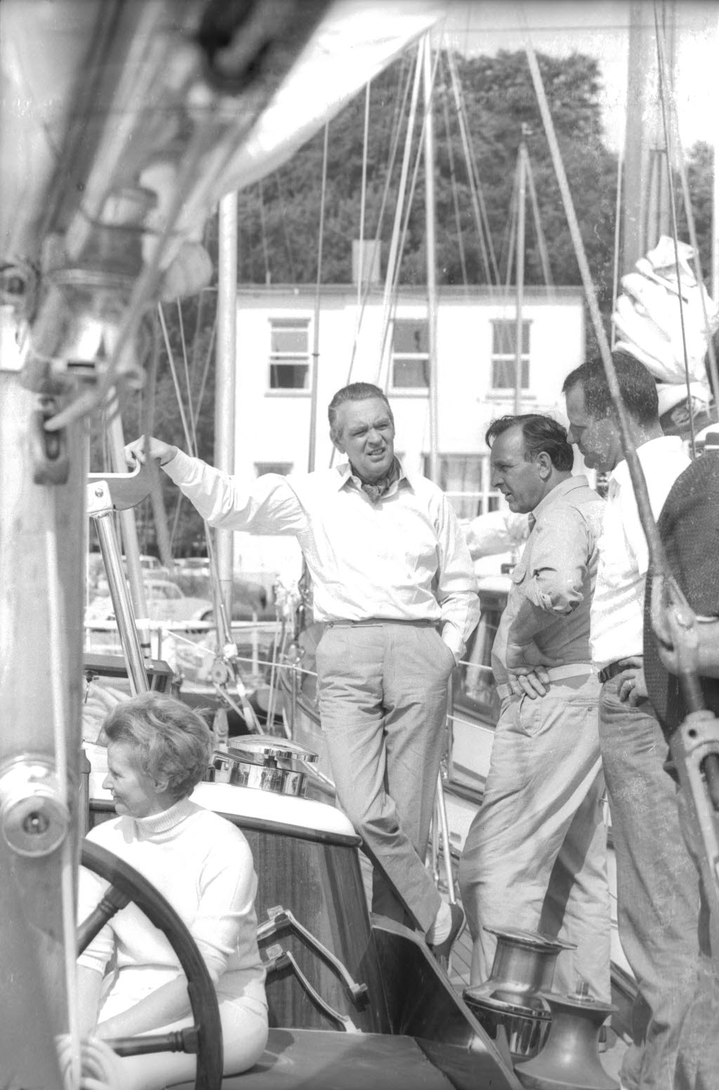 Bildmitte Berthold Beitz, stellvertretender Vorsitzender des Aufsichtsrates der Krupp AG an Bord der Krupp-Yacht Germania VI